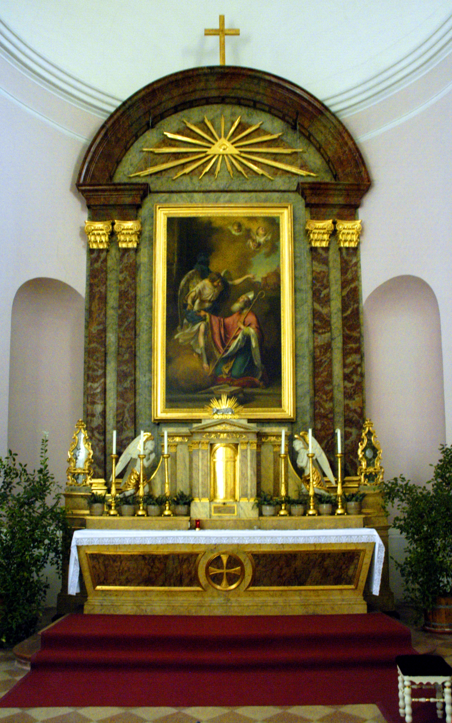 katholische Pfarrkirche heiliger Ulrich / Hochaltar